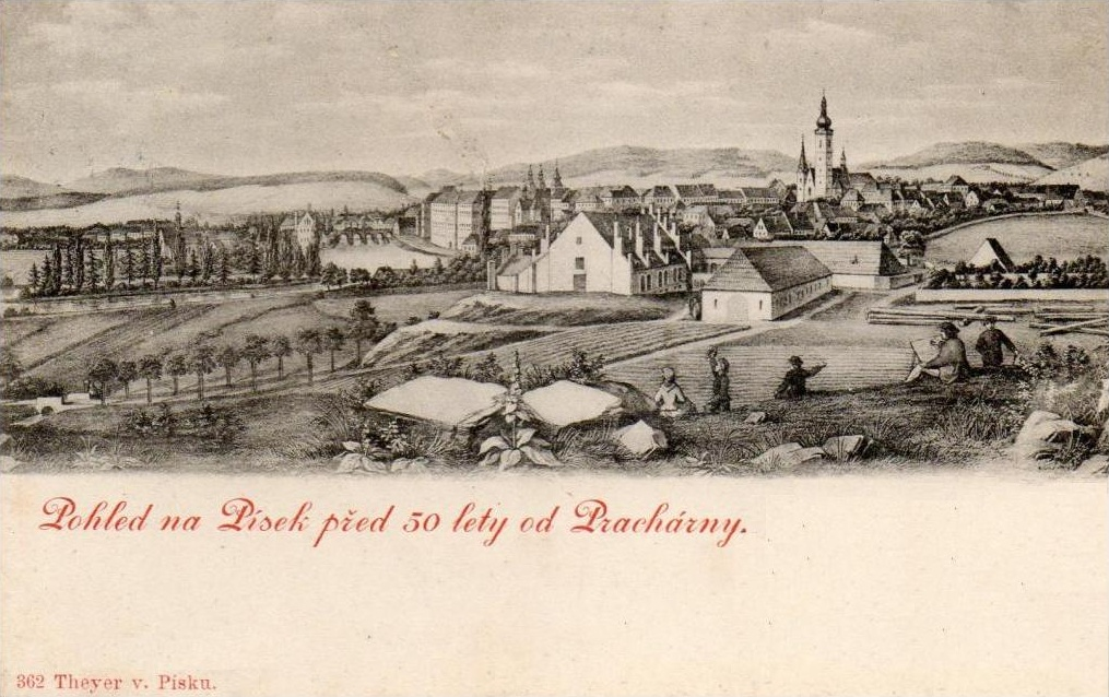 Pohled na Písek od Prachárny.